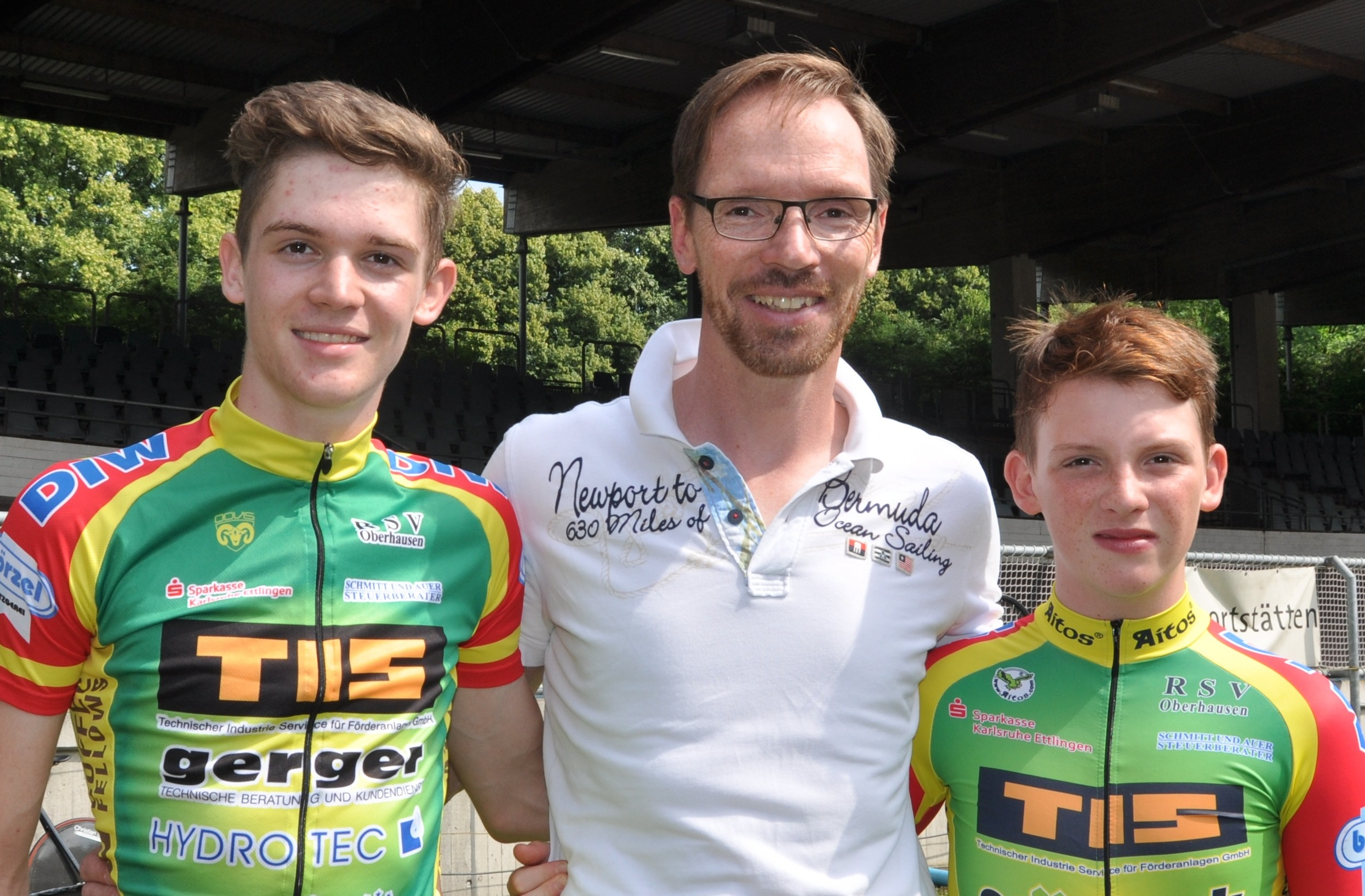 Erik Weispfenning (M.), deutscher Radsportler, mit seinen Söhnen Nils (l.) und Tim